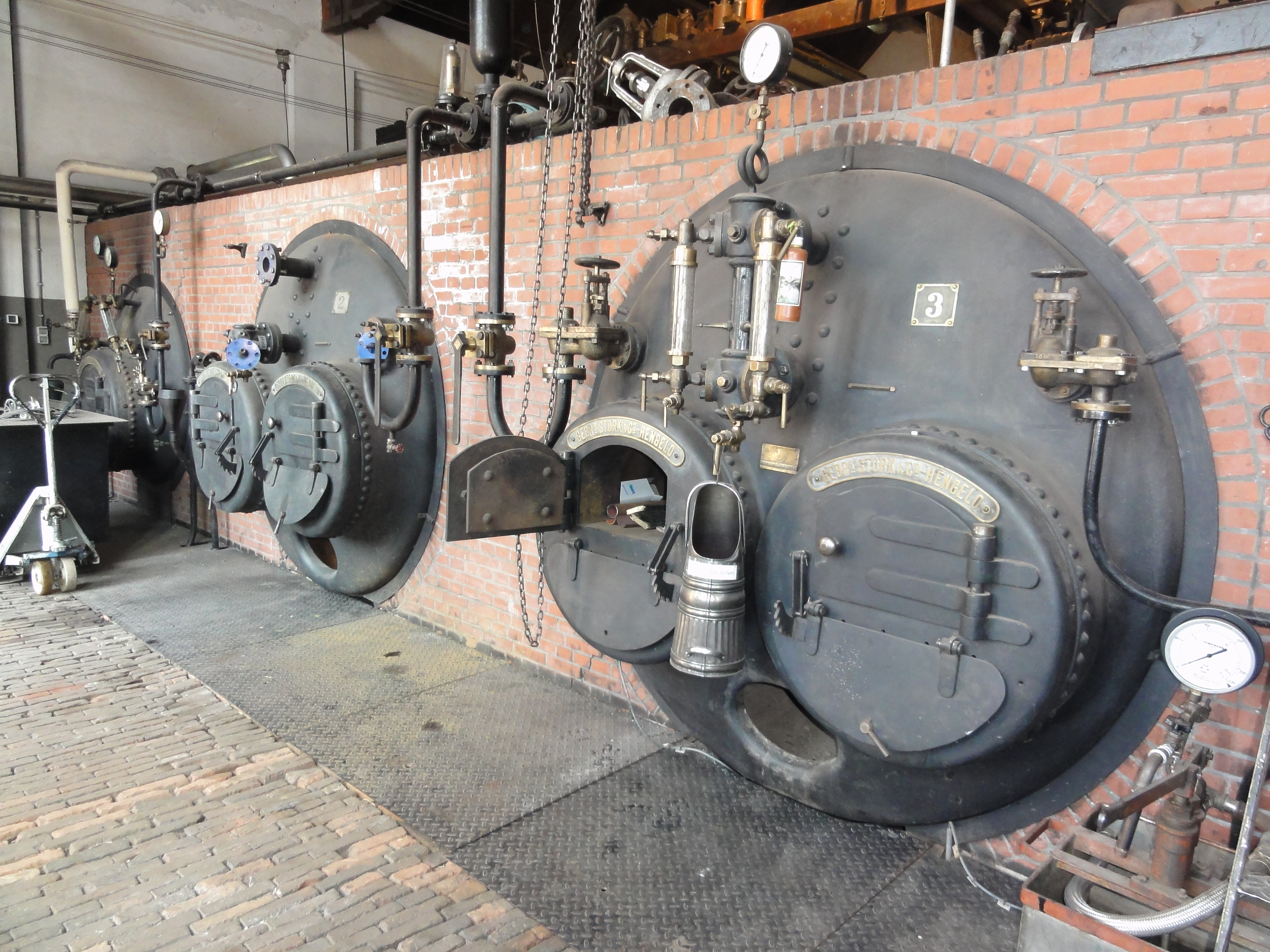 Appeltern, stoomgemaal de Tuut,de ketels in het ketelhuis